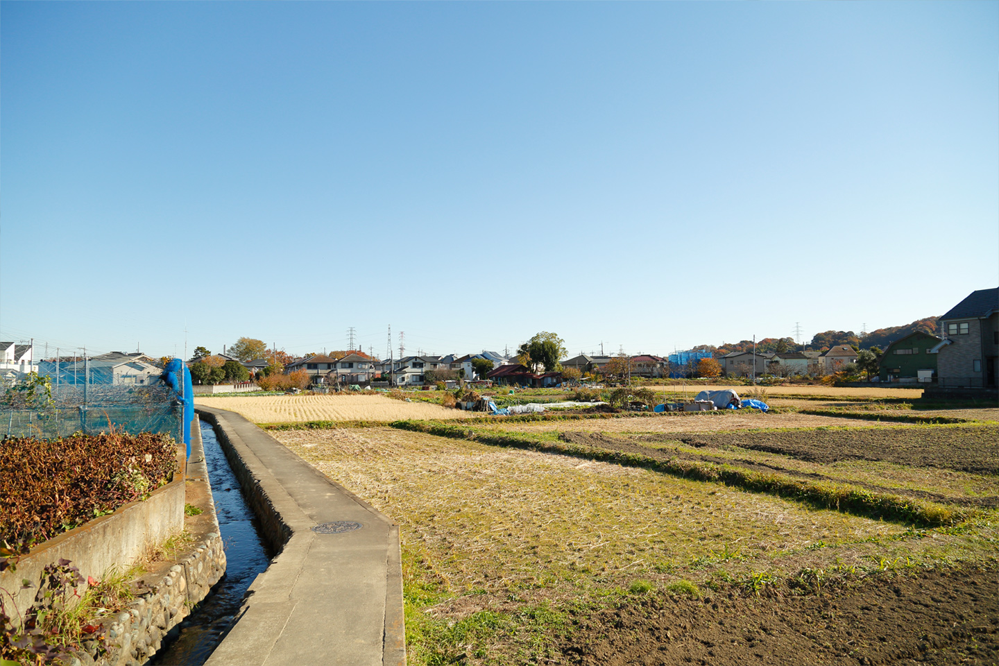 日野市落川（低地部）の田畑。